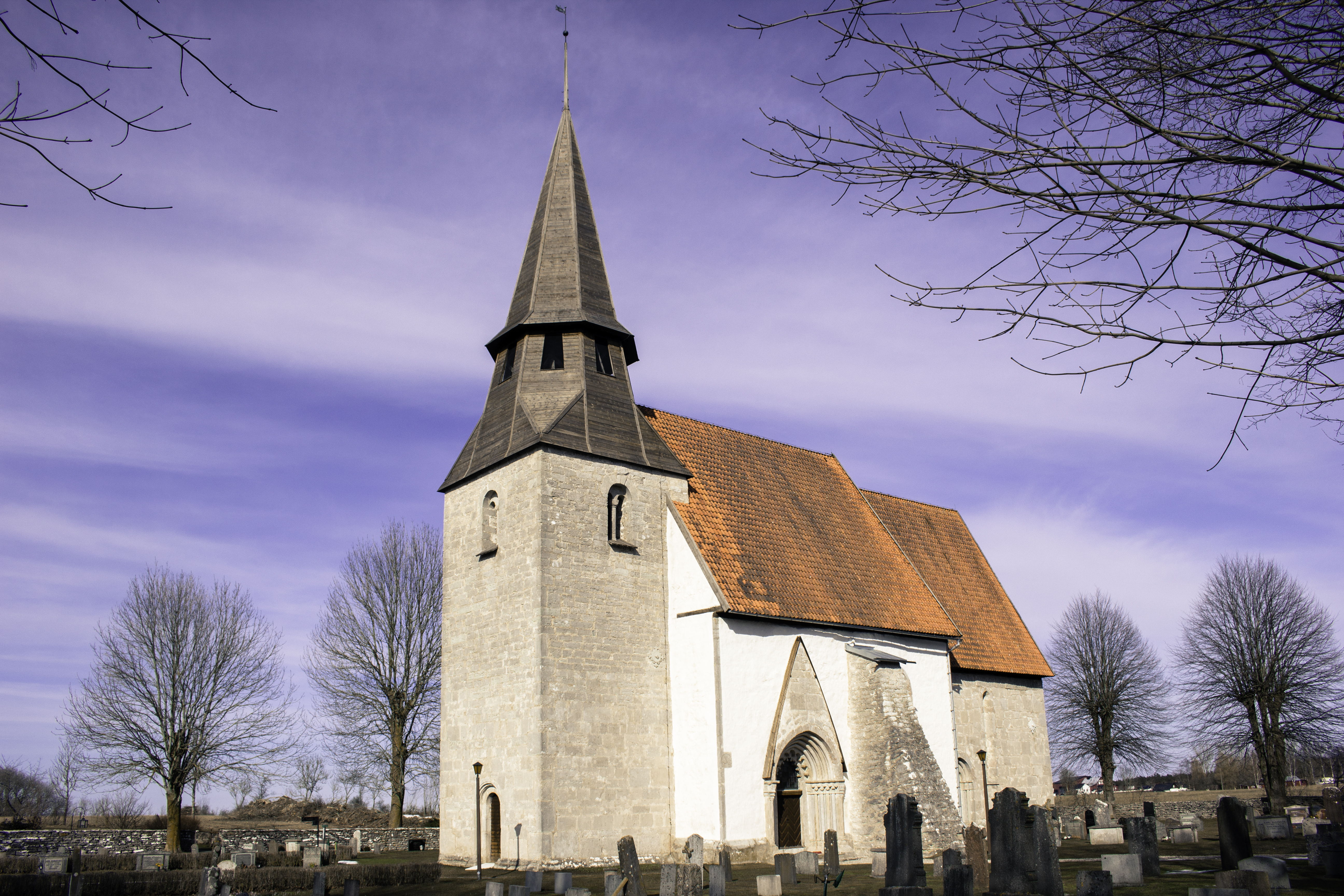 Igrexa de Vänge, na illa sueca de Gotland.